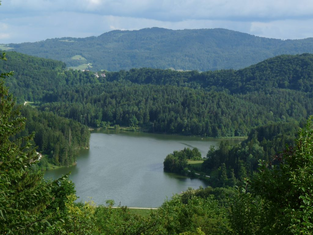 Gradiško jezero pri Lukovici